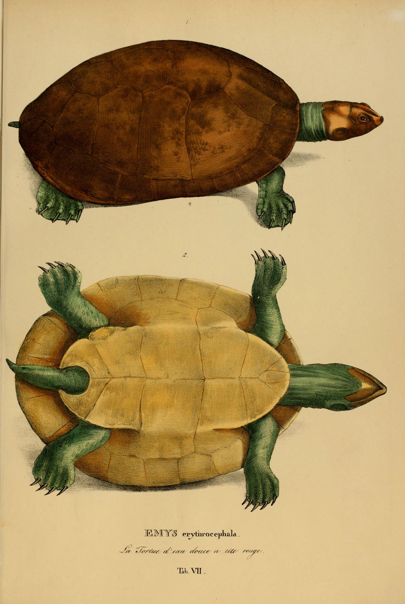 lE^ffYS erytm-ocepliala. Tab. VU .